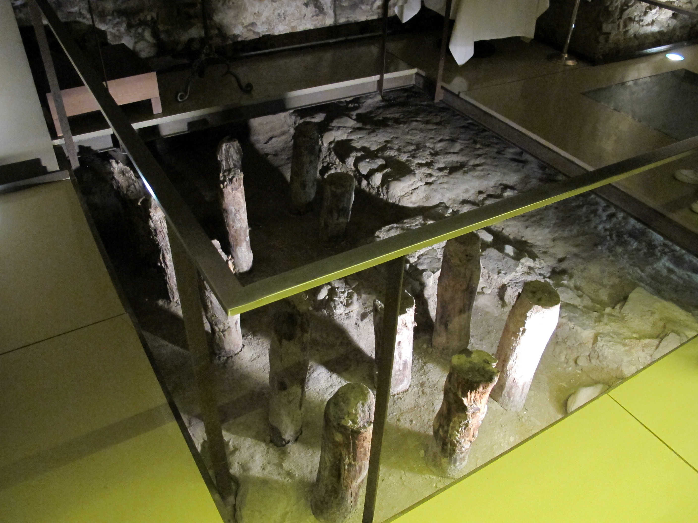 Palazzo dell'arte dei giudici e notai, scavi di una gualchiera romana